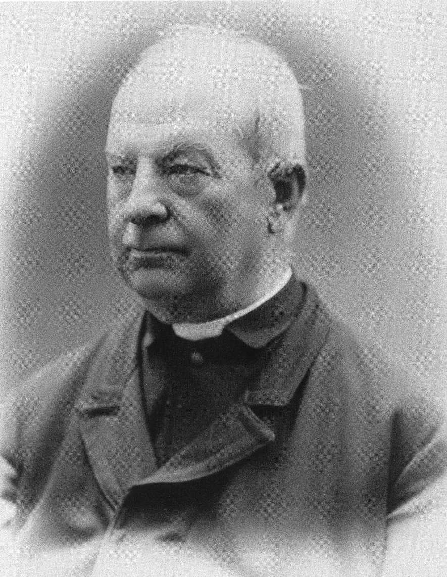 Der Pfarrer, Kunstsammler und Künstler Sebastian Mutzl, Enkering, Bistum Eichstätt, gestorben 1917